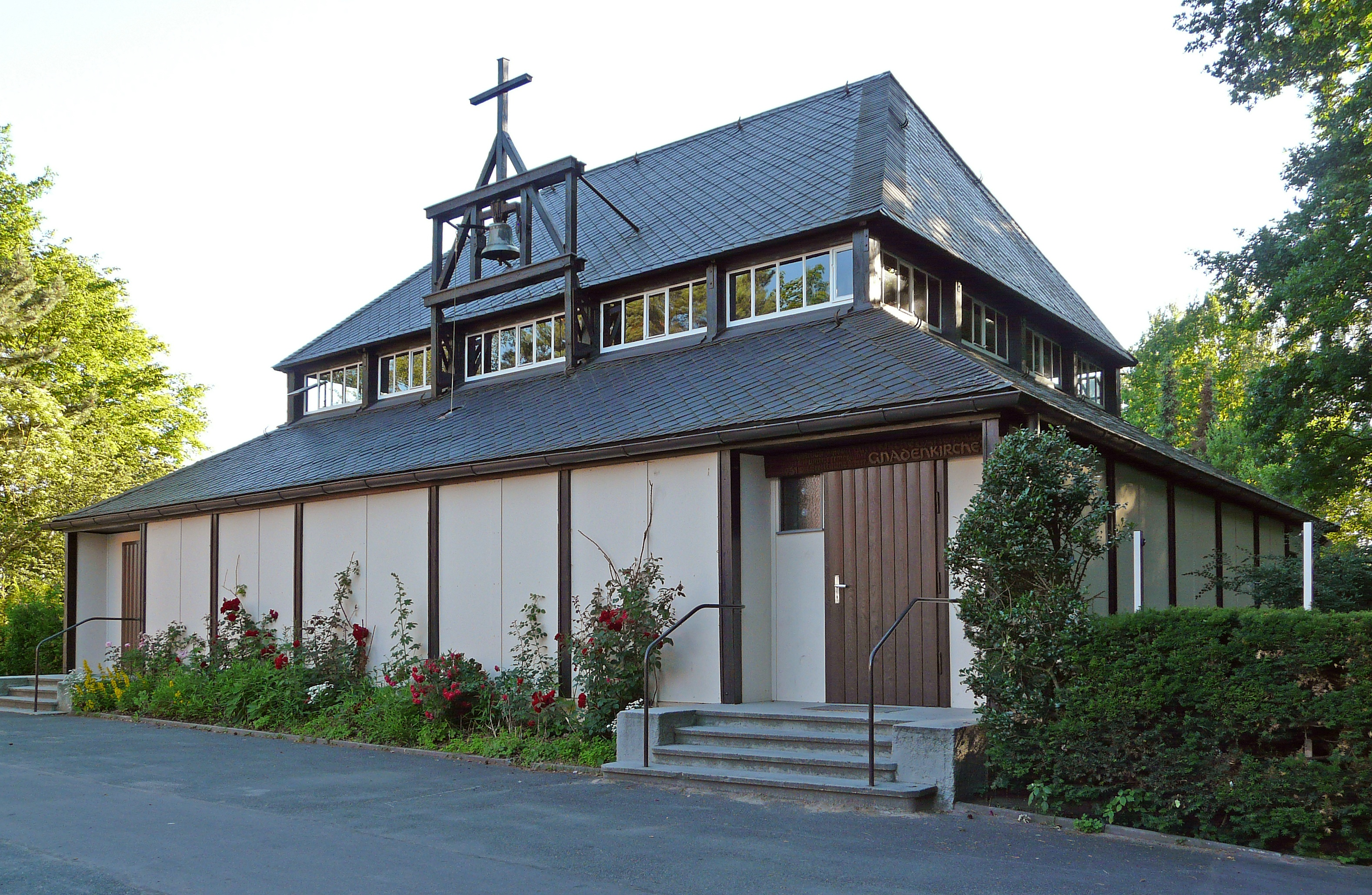 Die Ev. Gnadenkirche in Nürnberg (Stadtteil Schafhof, Neumeyerstraße 47), eine Notkirche von Otto Bartning (Typ D - Gemeindezentrum), eingeweiht 1951.